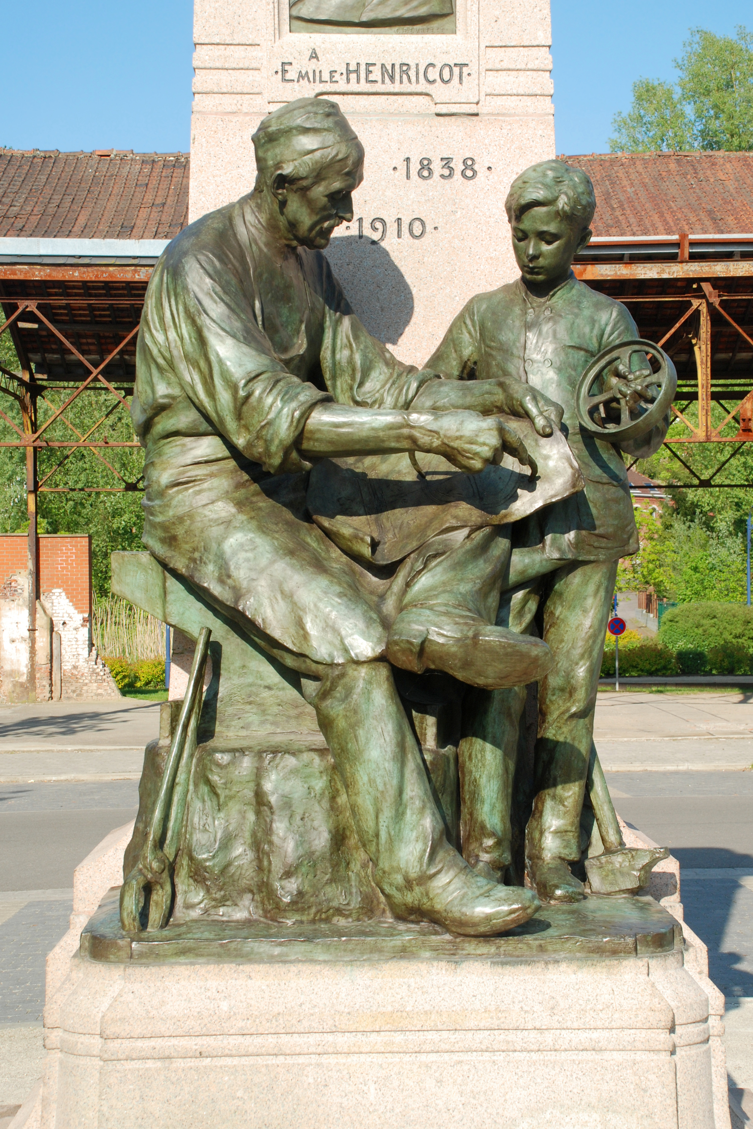 Belgique - Brabant wallon - Court-Saint-Etienne - Monument à Émile Henricot